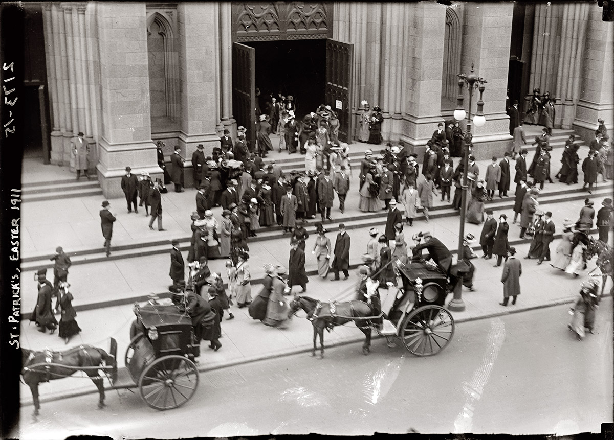 Собор Святого Патрика (Нью-Йорк). Восточный выход. Перед собором стоят кэбы.